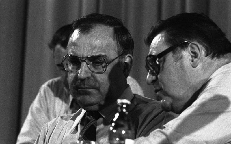 CSU-Wahlparteitag 1976 in München 25.-26.6.1976